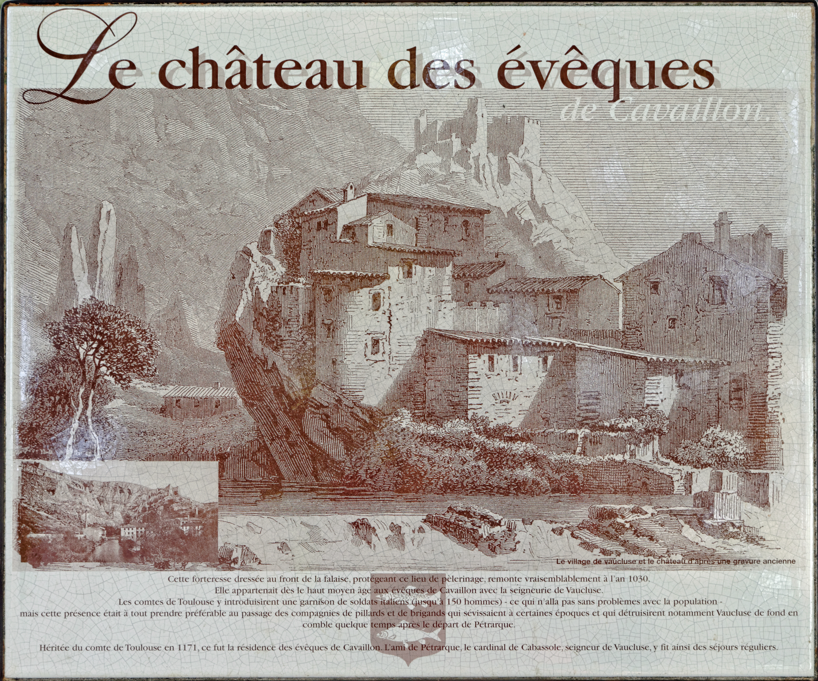 Plaque d'information sur le château, au bord de la Sorgue. Fontaine de Vaucluse. (Vaucluse, France).